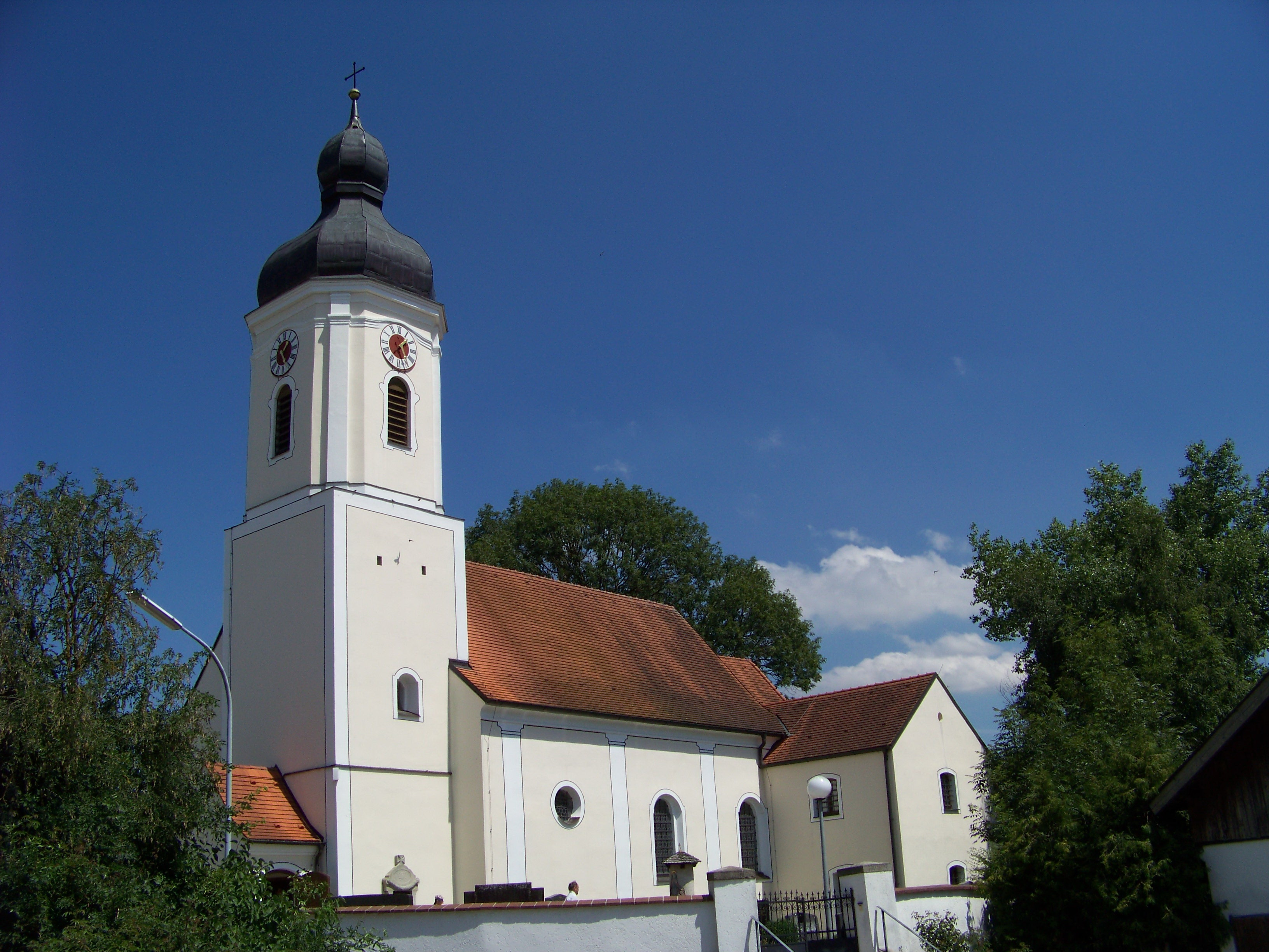 Essenbach, Artlkofen. Kath. Kirche St. Michael. 1. Hälfte 18. Jahrhundert, Turmuntergeschoß noch spätgotisch; mit Ausstattung.